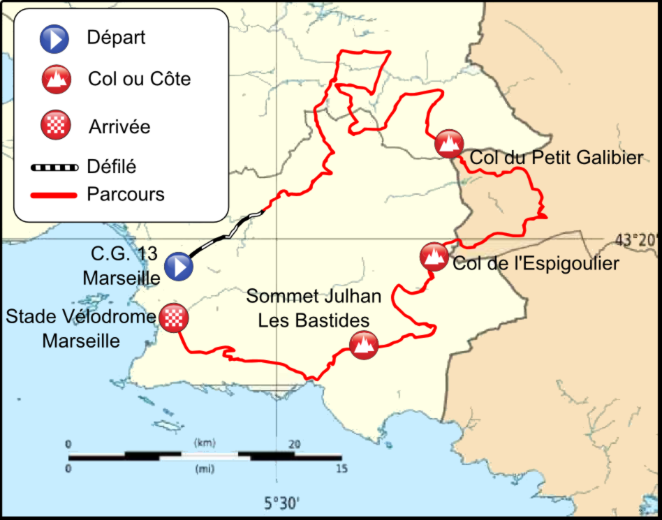 Parcours du Grand Prix d'Ouverture La Marseillaise 2012 Marseille - Marseille Dimanche 29 janvier 2012 148,1 km